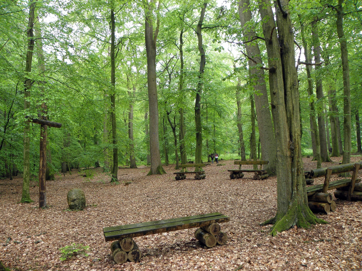 Der Ruheforst in der Wingst.